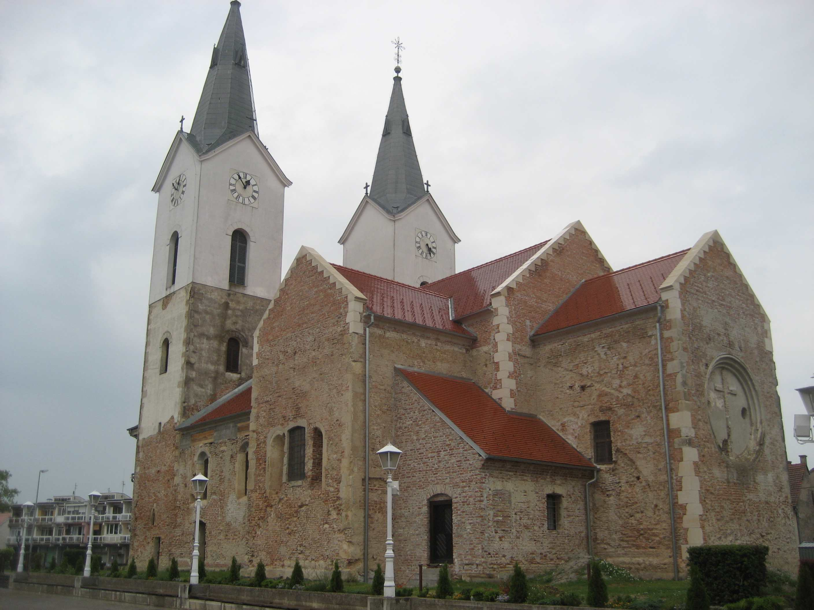 Sv. Magdalena u Cazmi